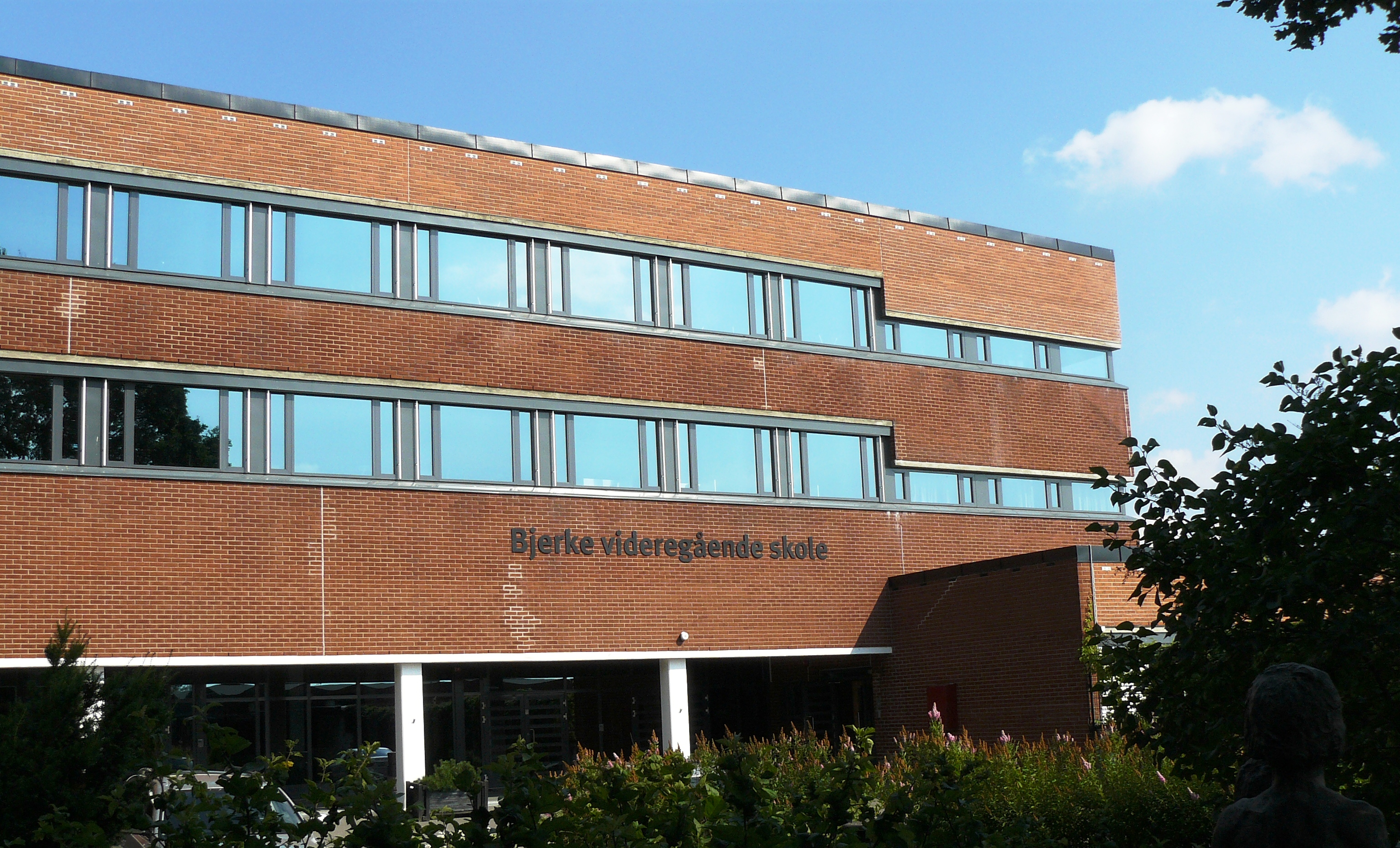 Bjerke High School, Oslo